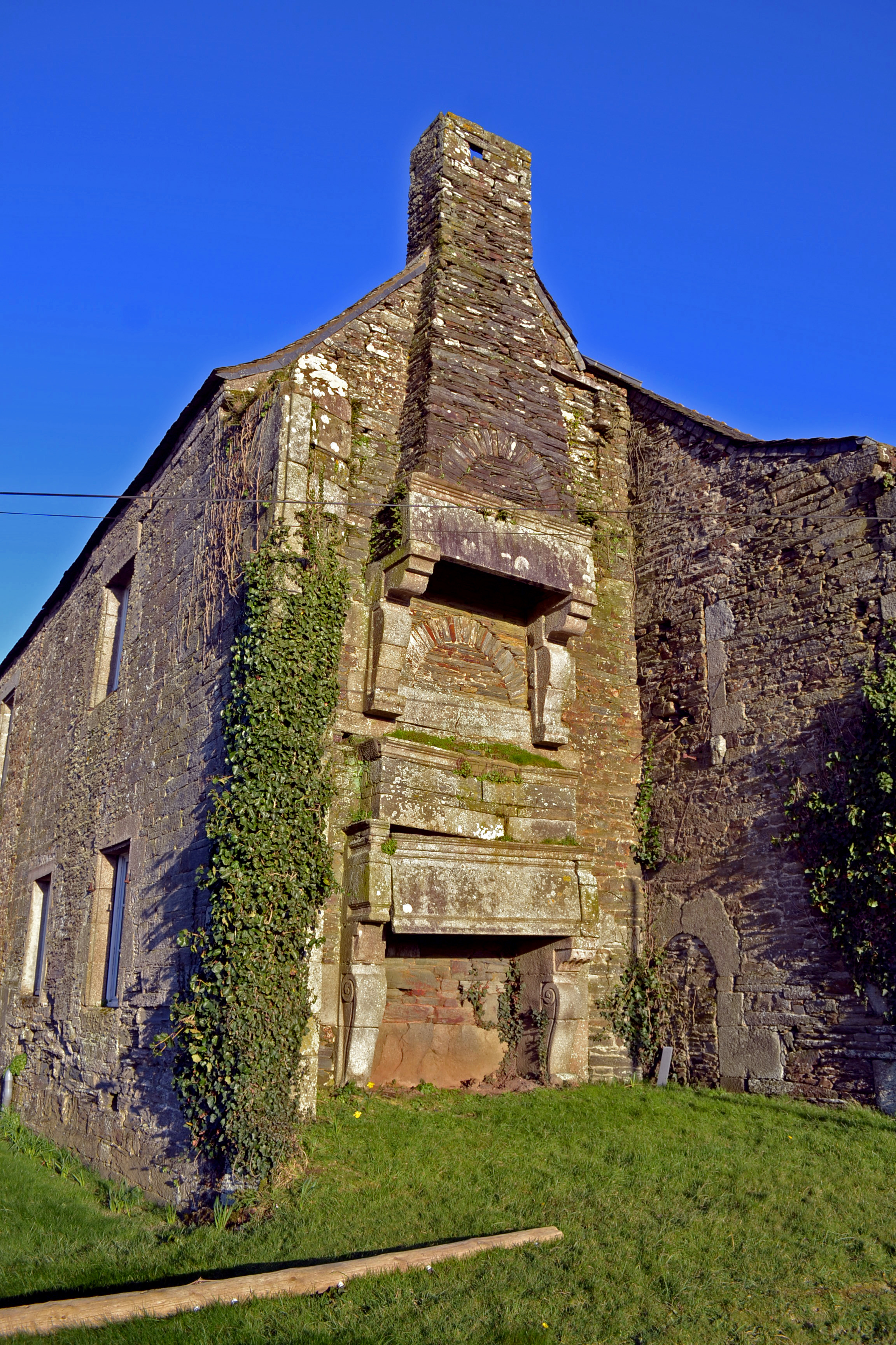 Manoir de Penanvern (Penvern), construit vers 1630 par Roland Du Louet, à Sainte-Sève (Finistère).